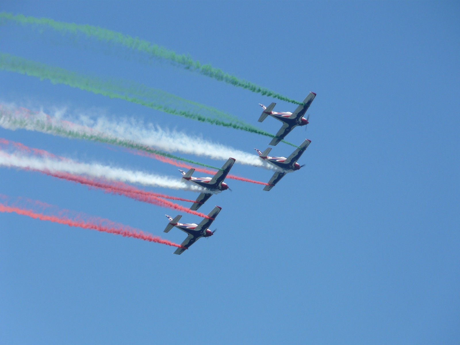 Pioneer Team en el Festival Aéreo de Vigo de 2009.